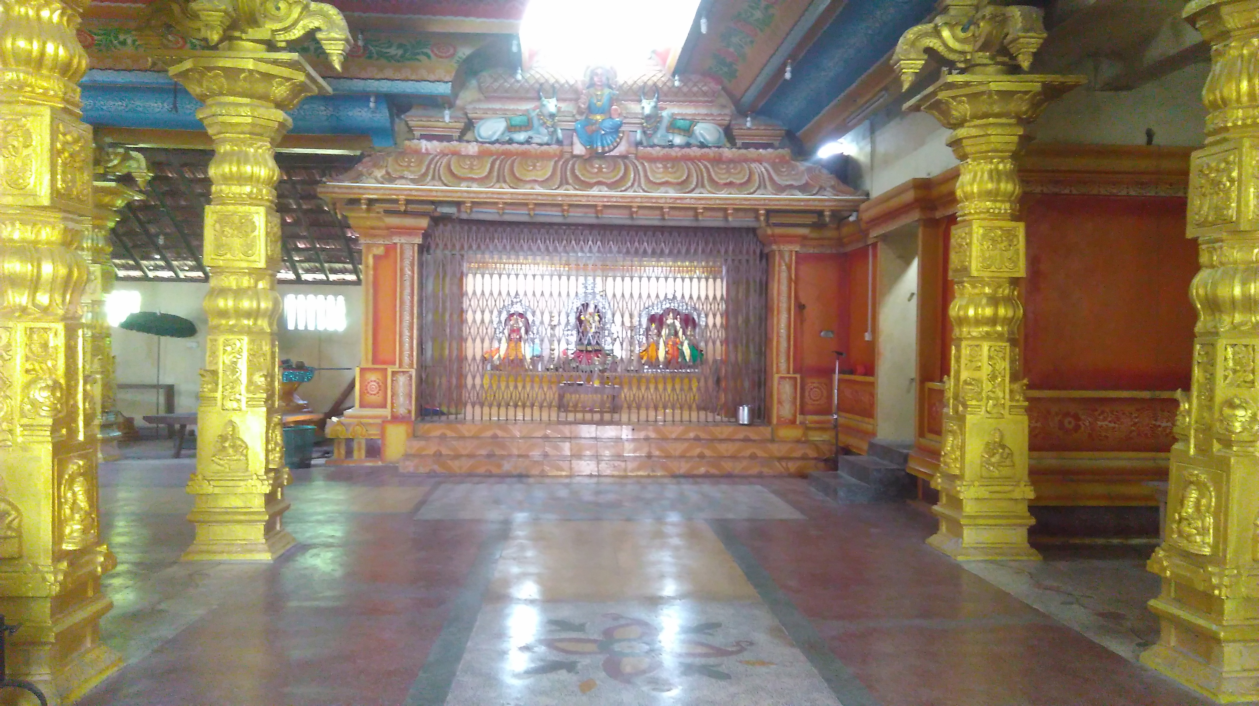 அம்பாளின் வசந்தமண்டபக்காட்சி